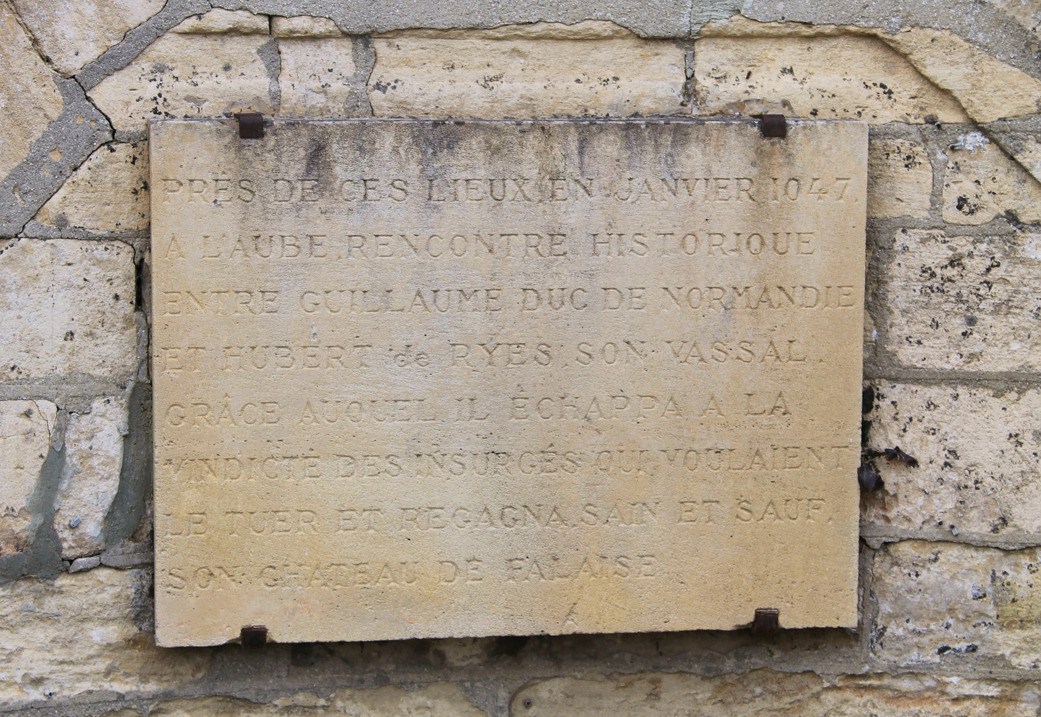 Plaque commémorant un évènement remarquable de l'histoire de Guillaume le Conquérant: "Près de ces lieux, à l'aube, rencontre historique entre Guillaume Duc de Normandie et Hubert de Ryes son vassal grâce auquel il échappa à la vindicité des insurgés qui voulaient le tuer et regagna sain et sauf son château de Falaise" située à l'entrée du cimetière de l'église Saint-Martin de Ryes (Calvados)